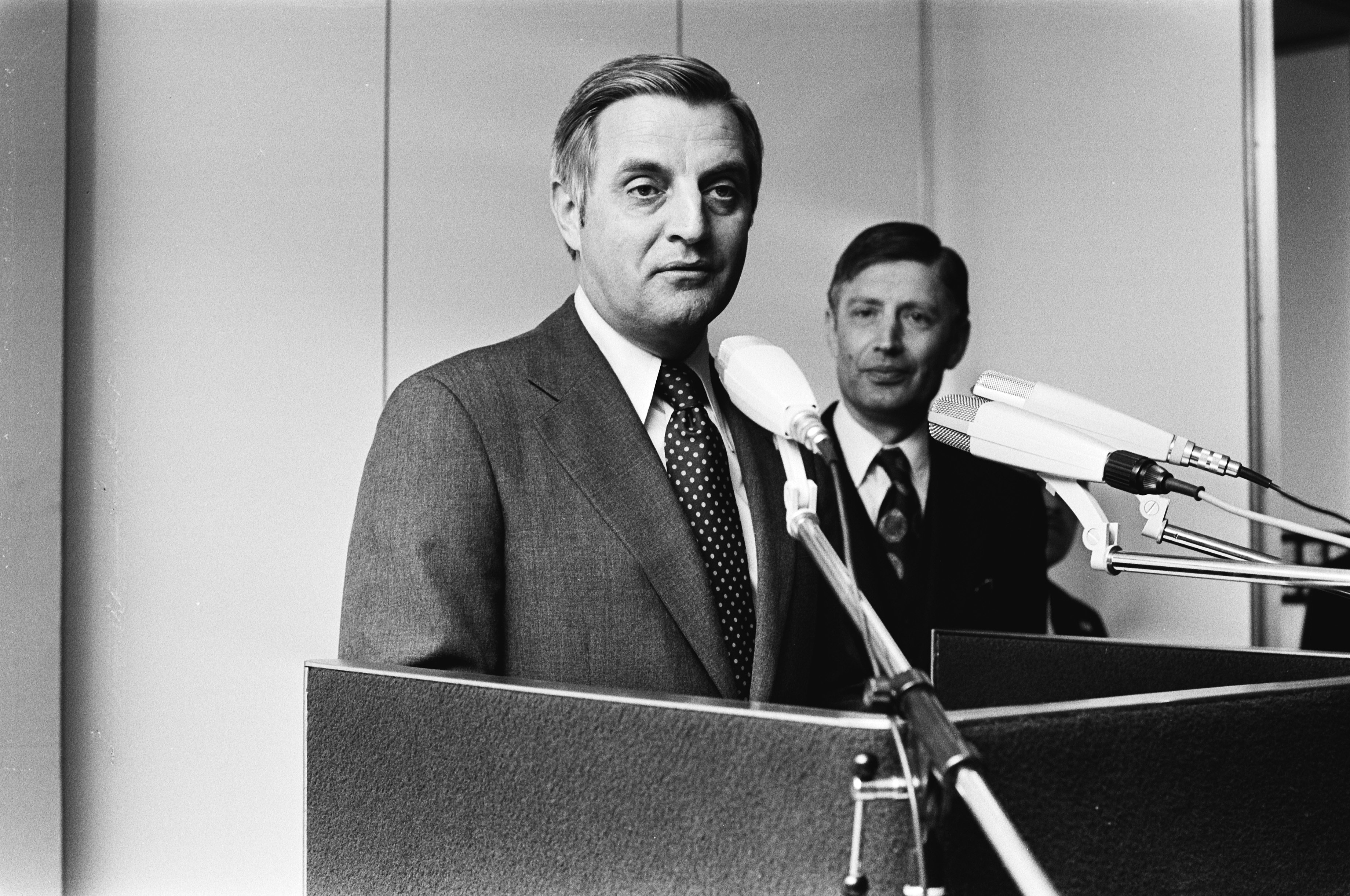 Collectie / Archief : Fotocollectie Anefo Reportage / Serie : Amerika's vice president Walter Mondale een dag in Nederland Beschrijving : Mondale en van Agt Datum : 21 april 1979 Locatie : Noord-Holland, Schiphol Trefwoorden : groepsportretten, politici, premiers Persoonsnaam : Agt, Dries van, Mondale, Walter Fotograaf : Bogaerts, Rob / Anefo Auteursrechthebbende : Nationaal Archief Materiaalsoort : Negatief (zwart/wit) Nummer archiefinventaris : bekijk toegang 2.24.01.05 Bestanddeelnummer : 930-2246